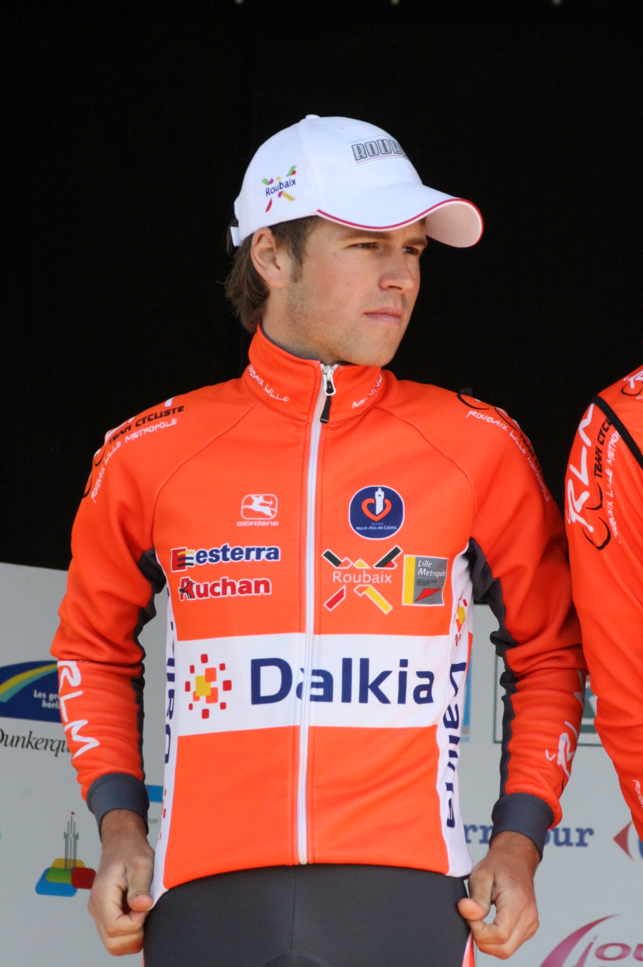 Jocelyn Bar, lors de la présentation des équipes des 4 jours de Dunkerque 2010